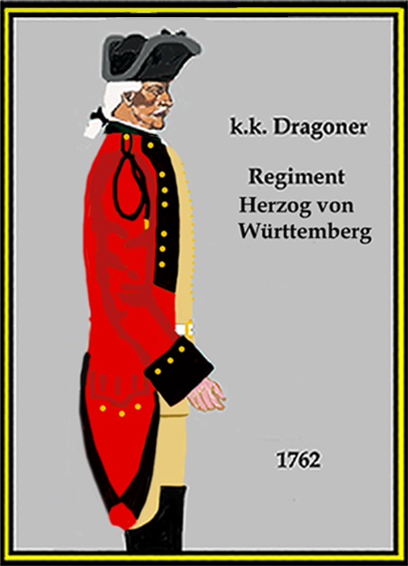 Österreichishes Dragoner-Regiment „Herzog von Württemberg“ 1762 (Aus: L.& F. Funcken - „L'Uniforme et les Armes des soldats de la guerre en dentelle II“) Castermann (Tournai 1976)